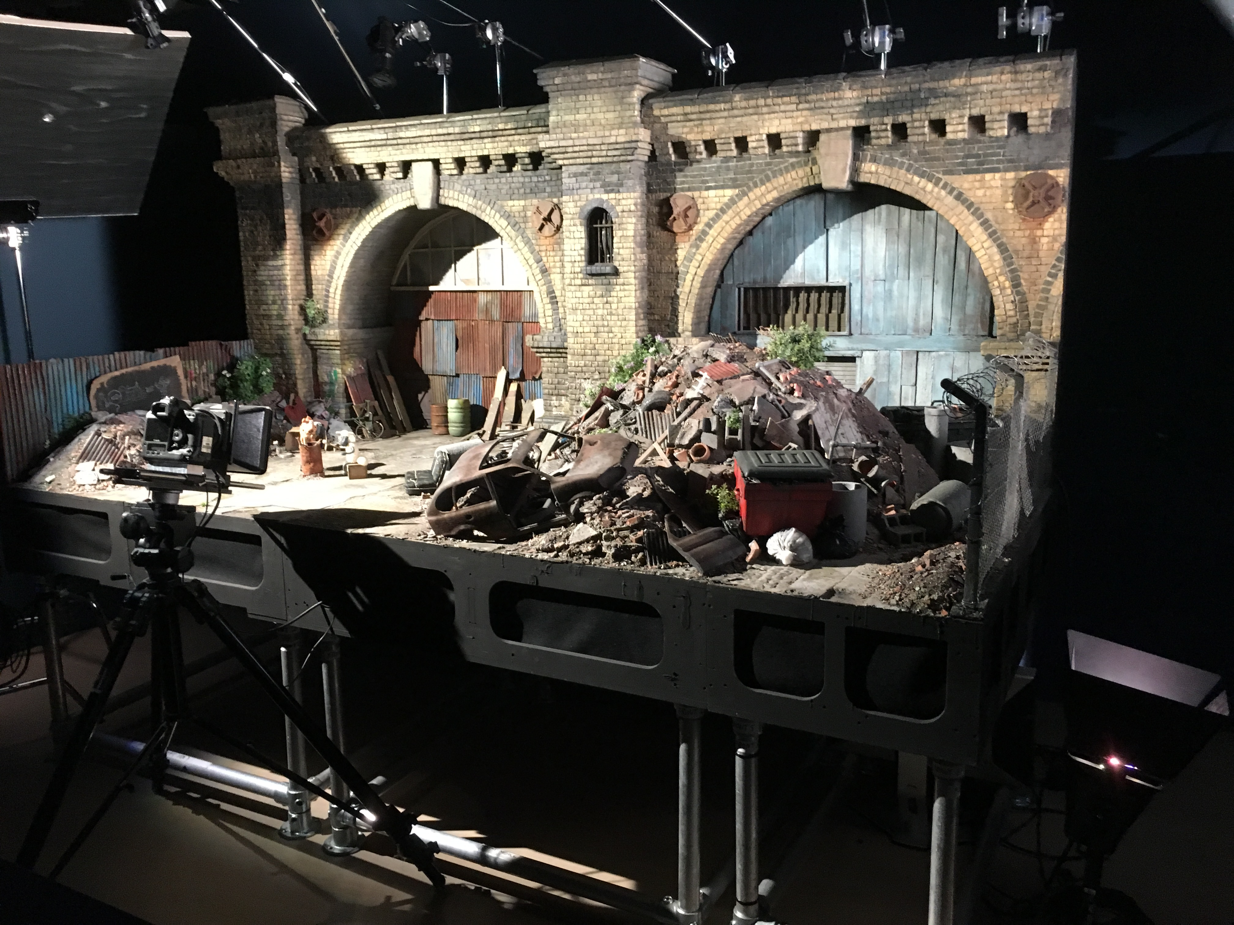 Filmset aus einem Aardman Animations Film (Shaun das Schaf – Der Film).